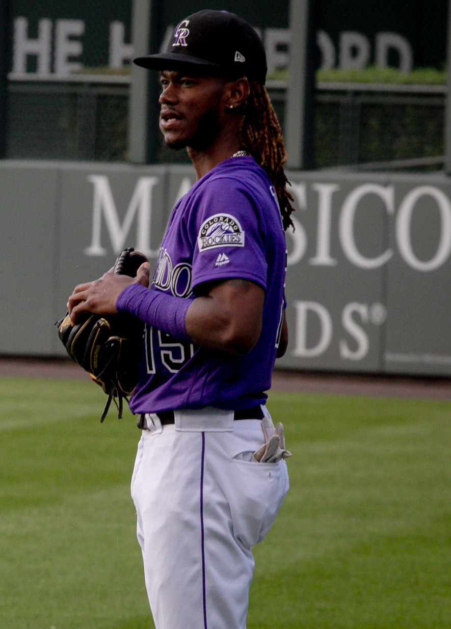 Raimel Tapia